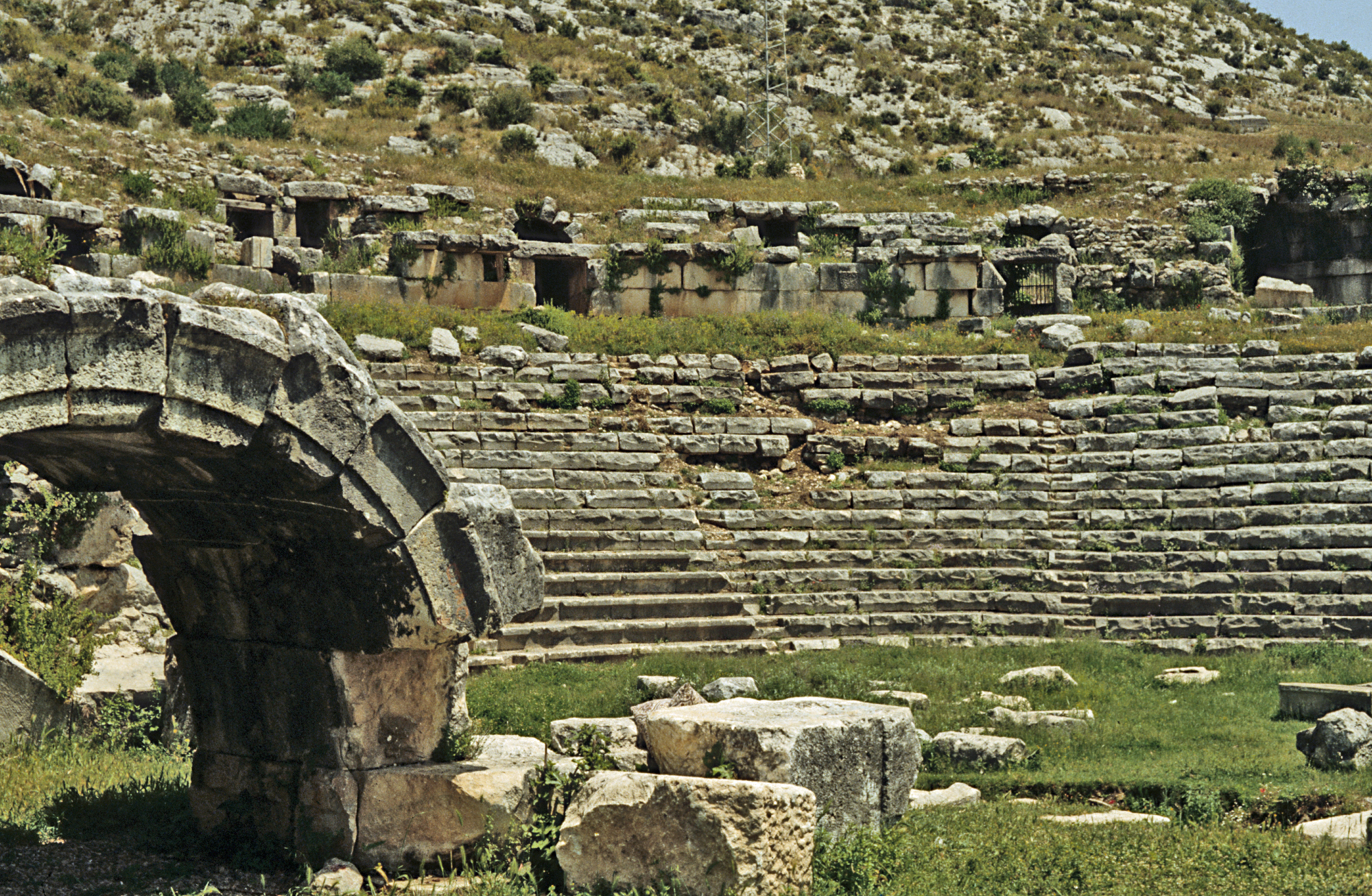 Limyra, Südwesttürkei, Theater